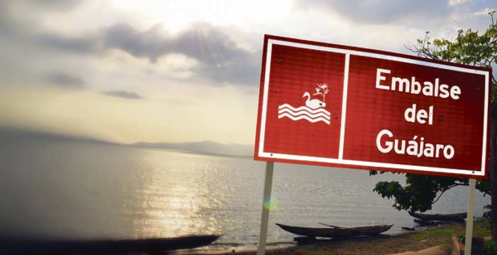 Embalse del Guajaro